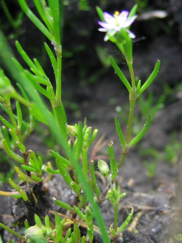 Salz-Schuppenmiere Spergularia salina, Zingst